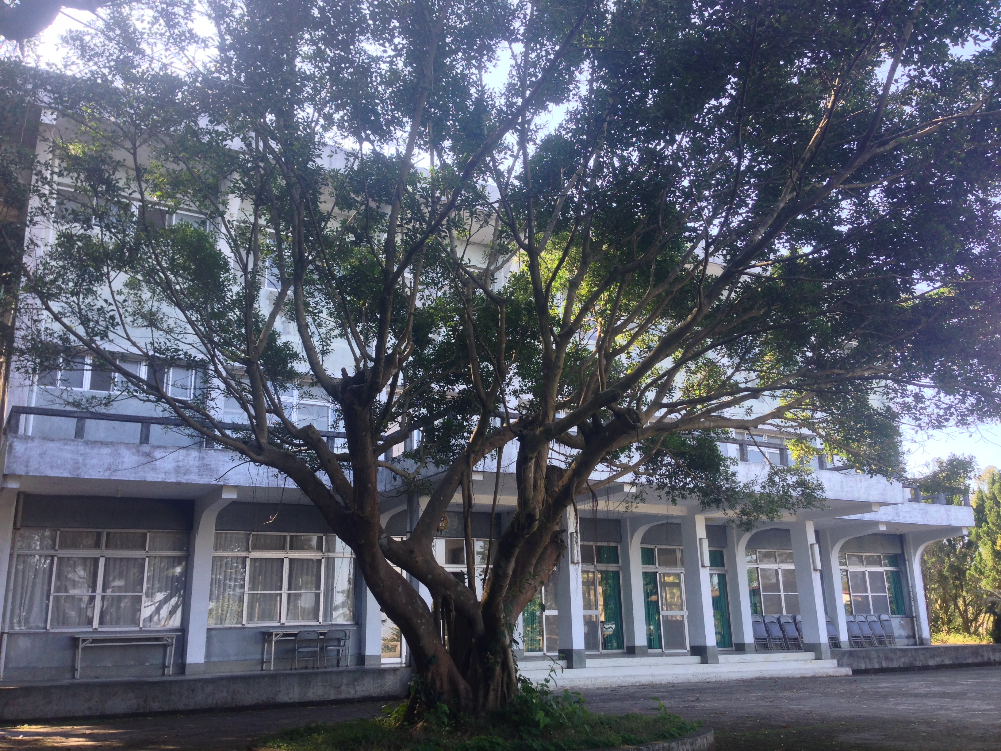 中華民國台灣女童軍訓練中心